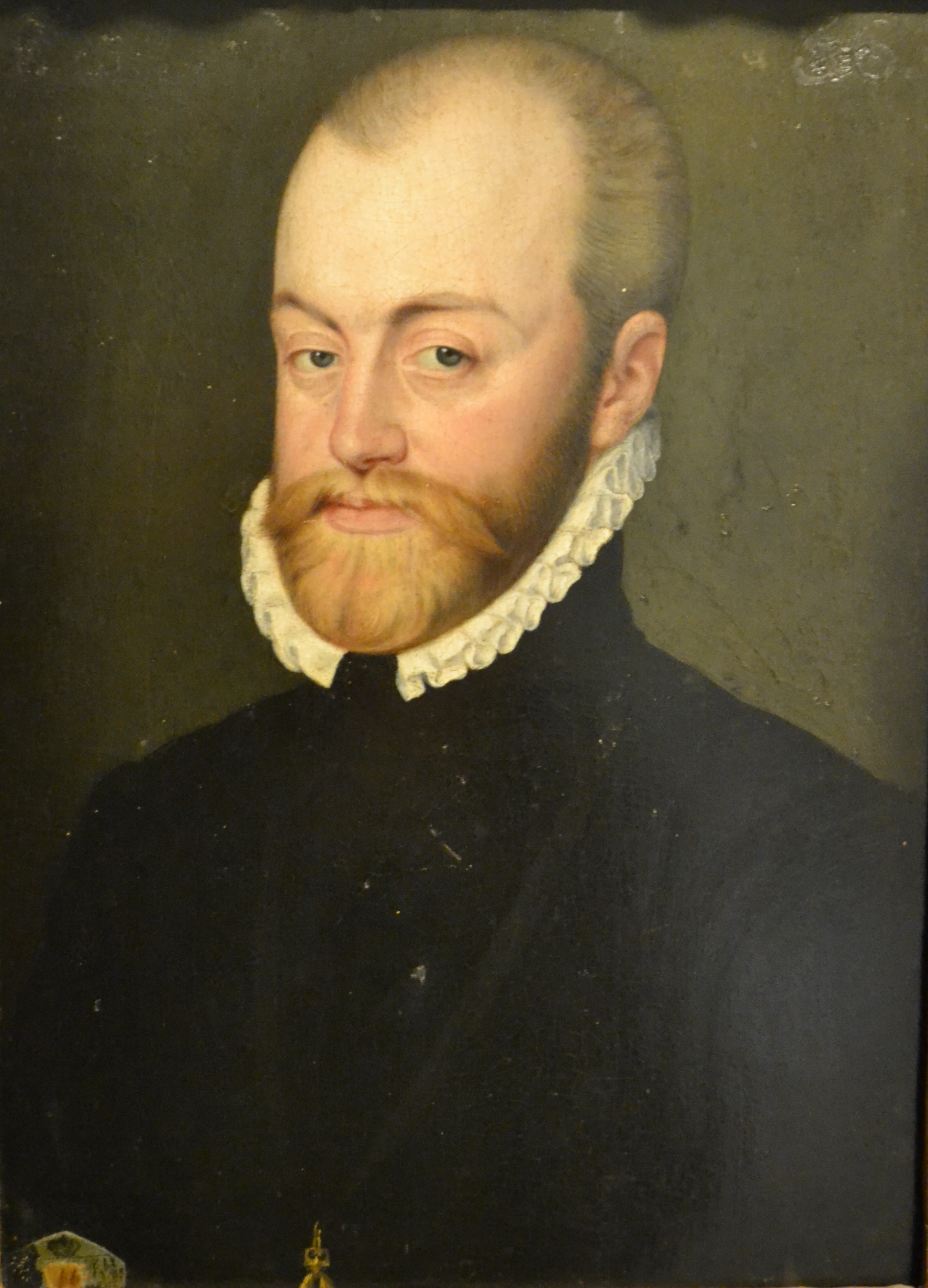 Retrato del rey Felipe II de España (1527-1598), que fue hijo del emperador Carlos I de España y de la emperatriz Isabel de Portugal.